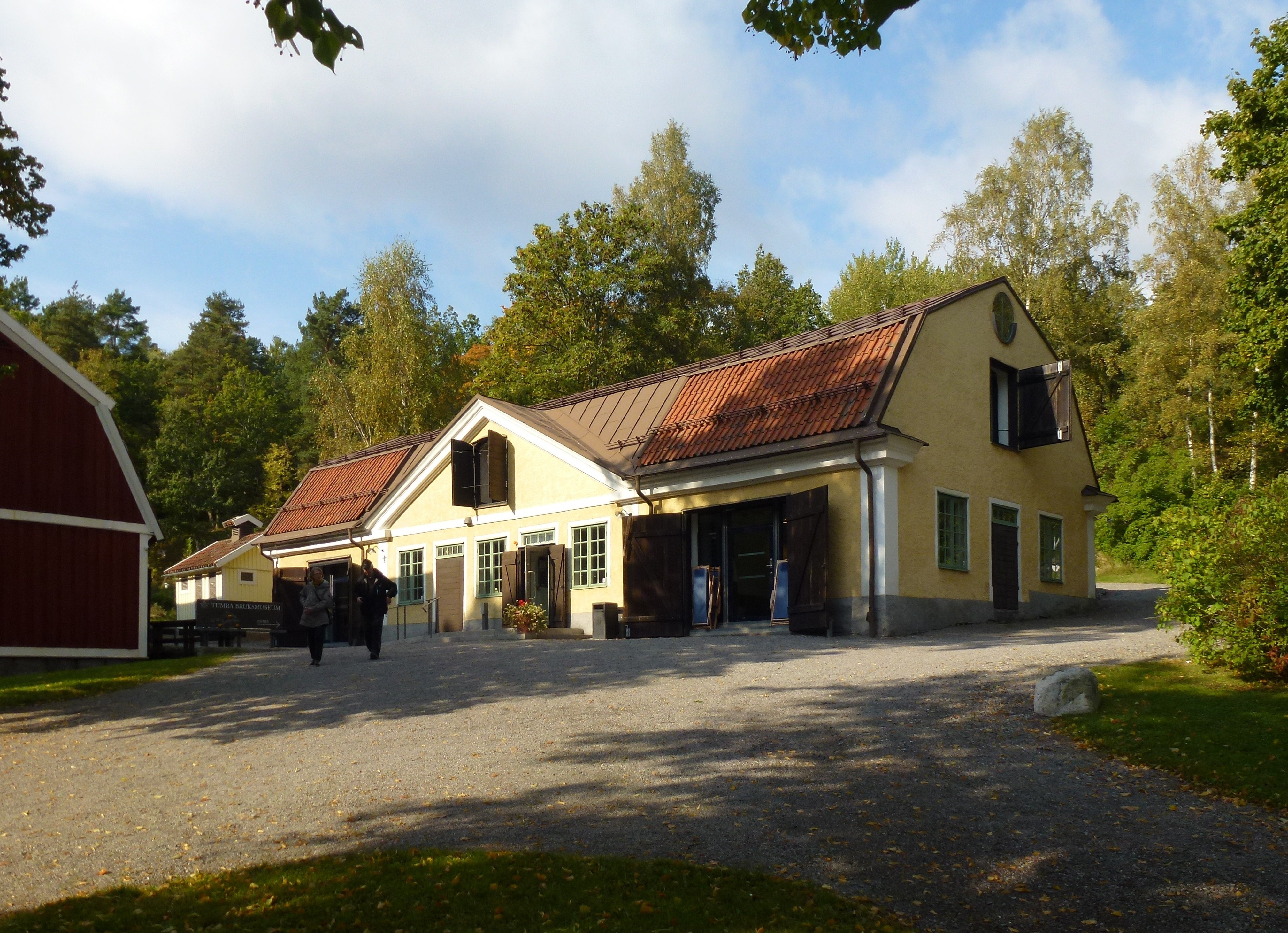 Tumba pappersbruk, museum